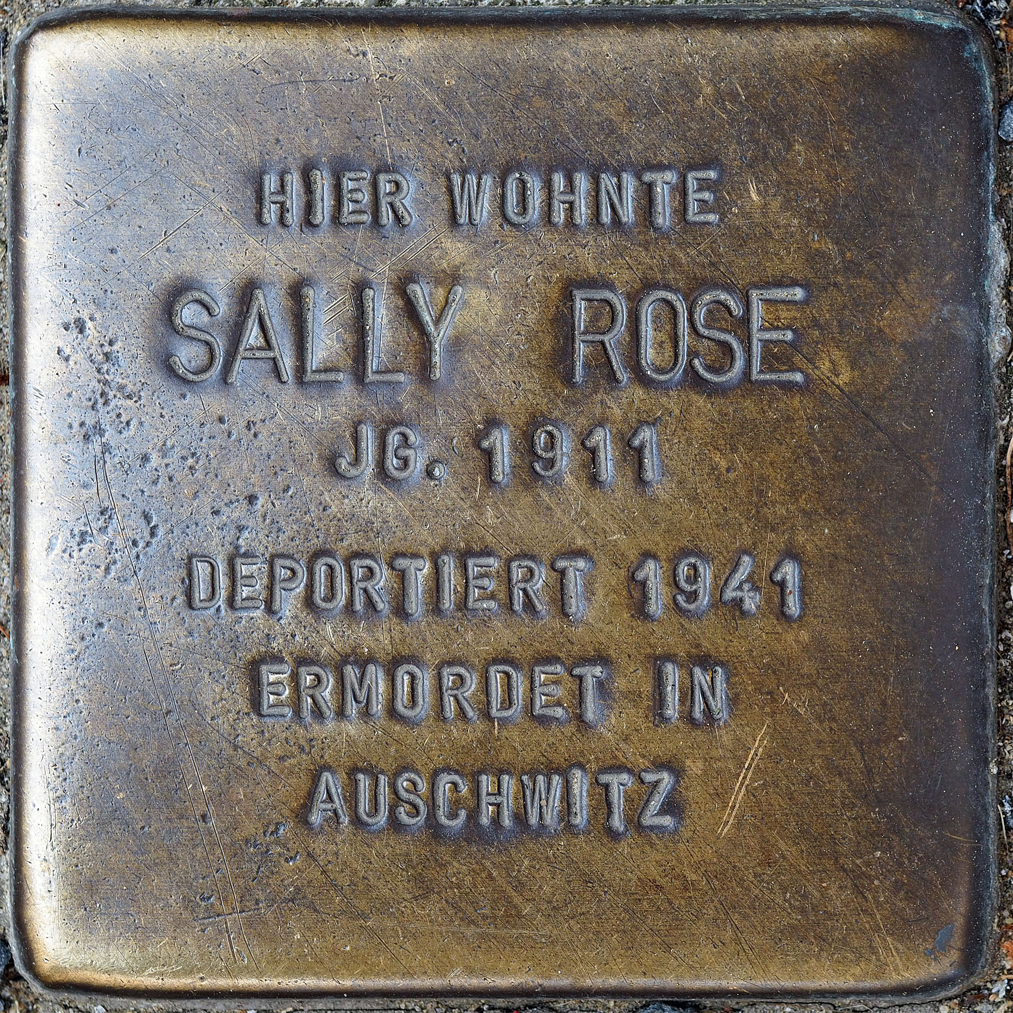 Stolpersteine MG: Rose, Sally